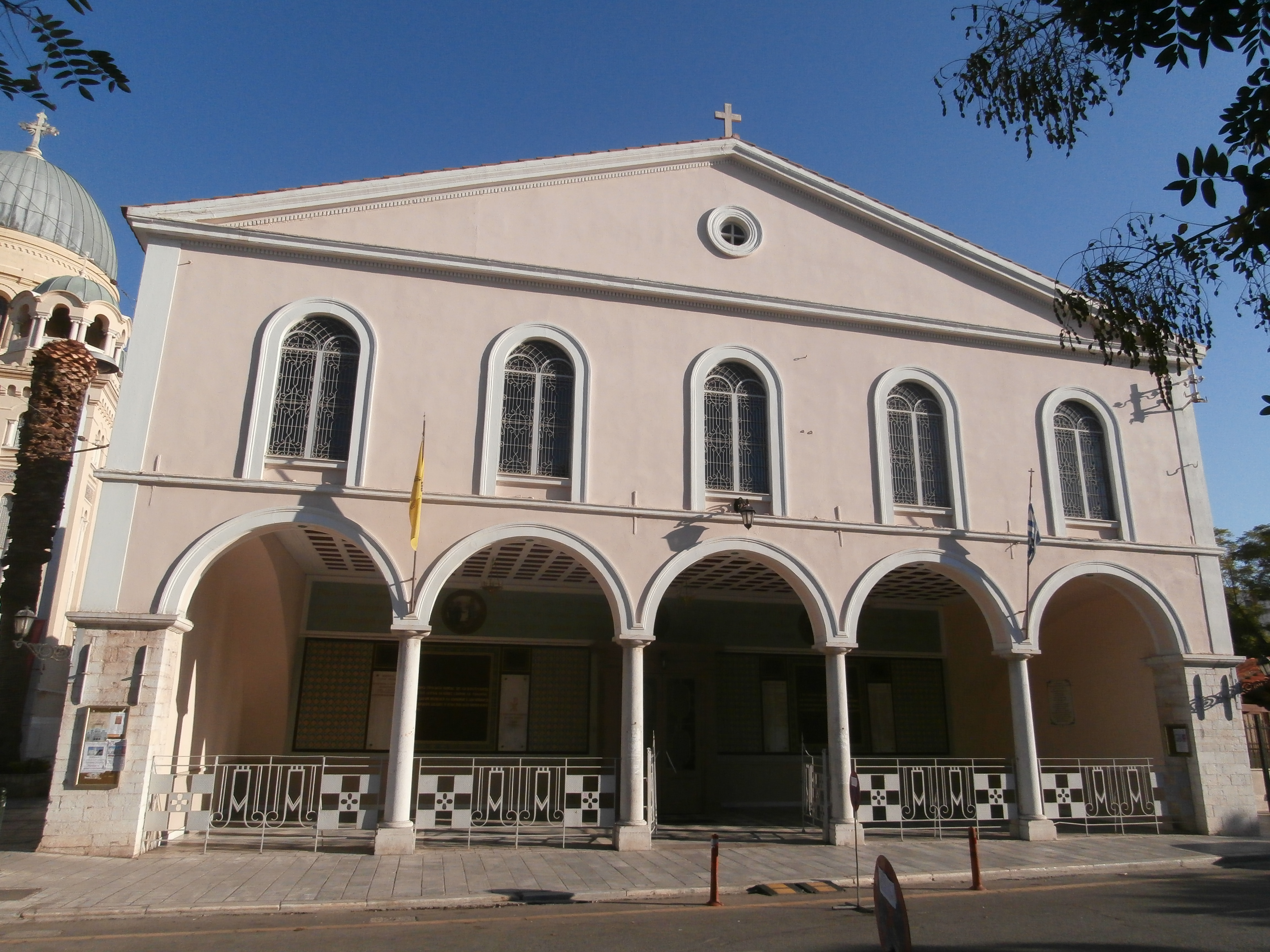 Ιερός ναός Αγίου Ανδρέα«Ιερός ναός Αγίου Ανδρέα»